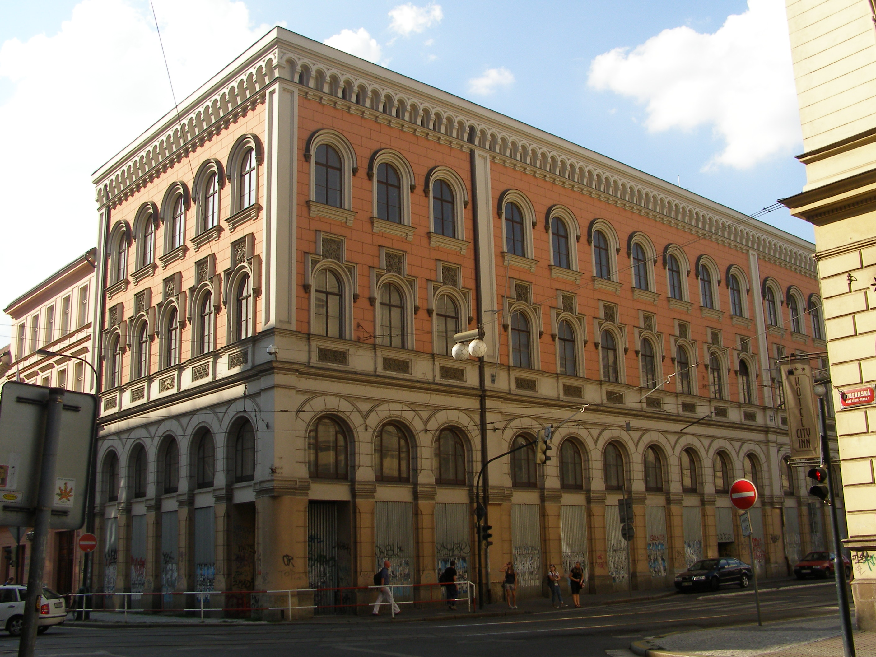 Palác Lannův (Nové Město), Praha 1, Hybernská 1030/11, Nové Město